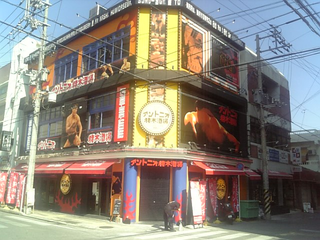 Dvc00040.Jpg